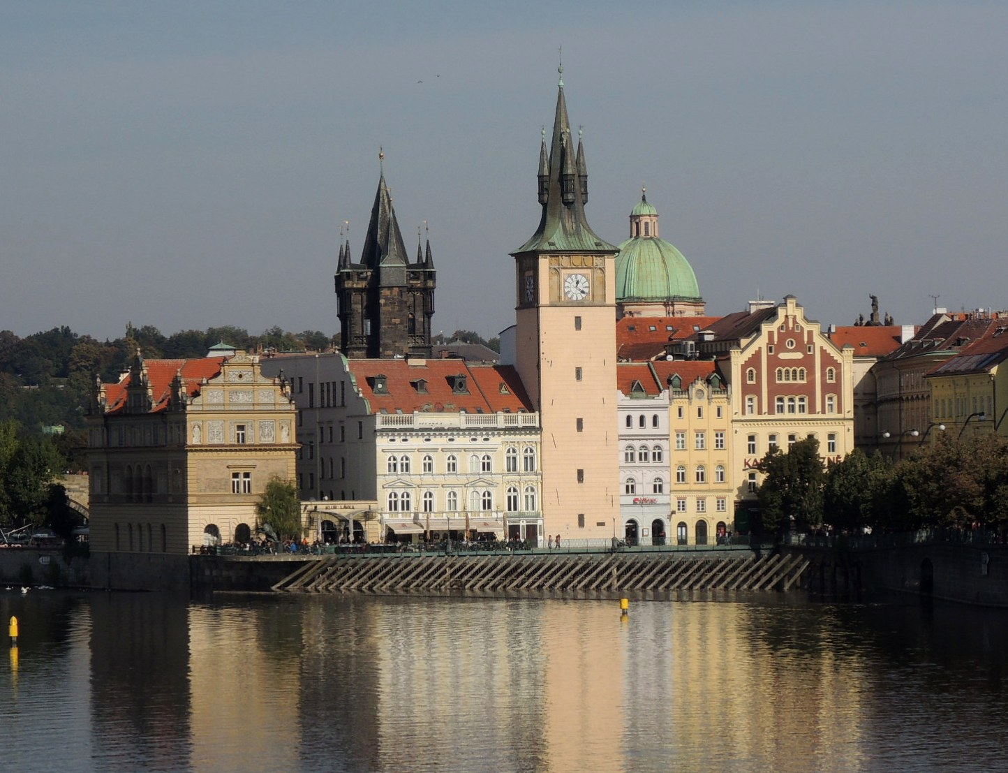 Novotného lávka od J